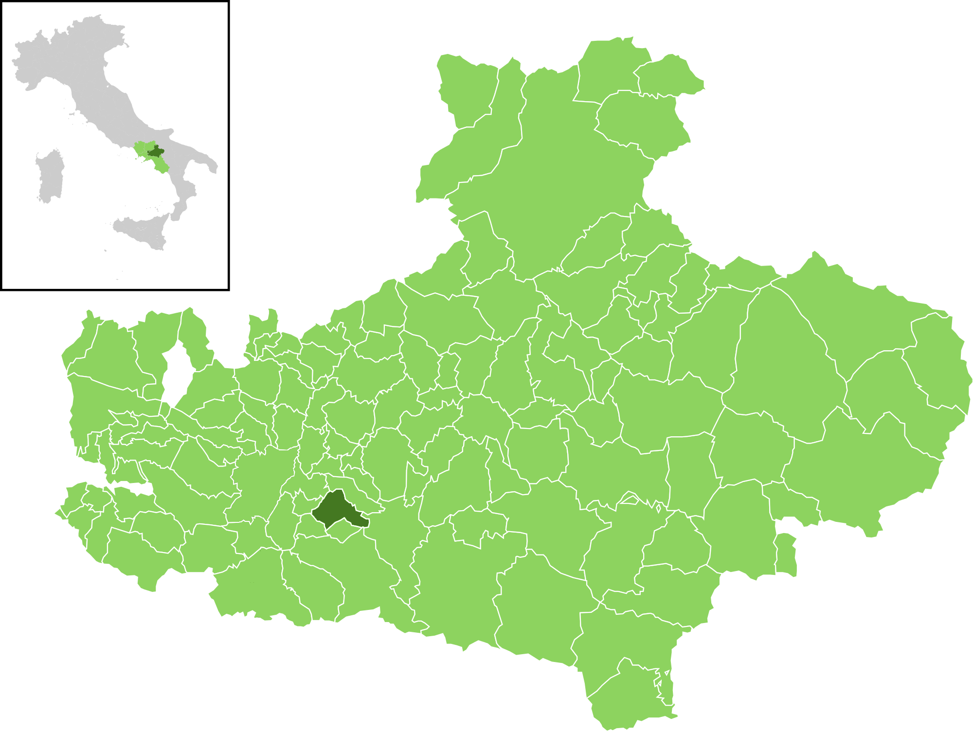 Posizione del comune all'interno della provincia di Avellino